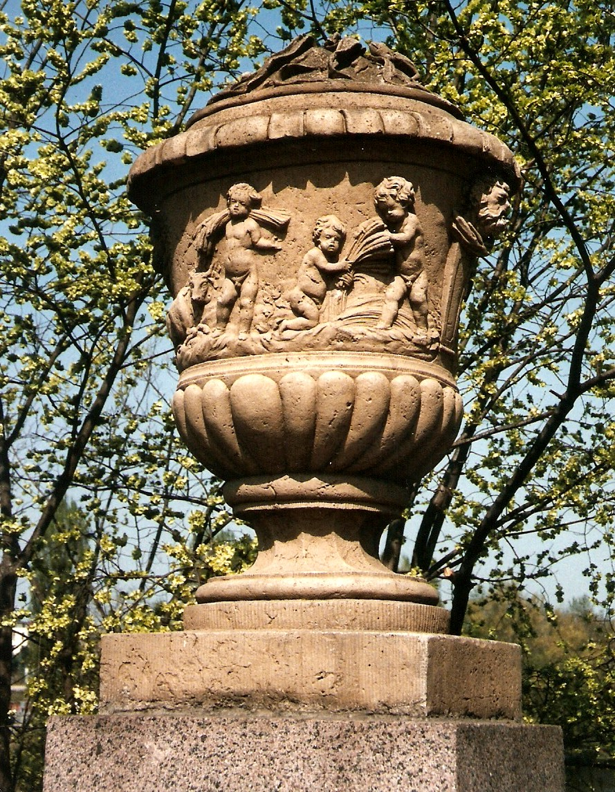 Vase (Ackerbau) auf der Lübecker Puppenbrücke